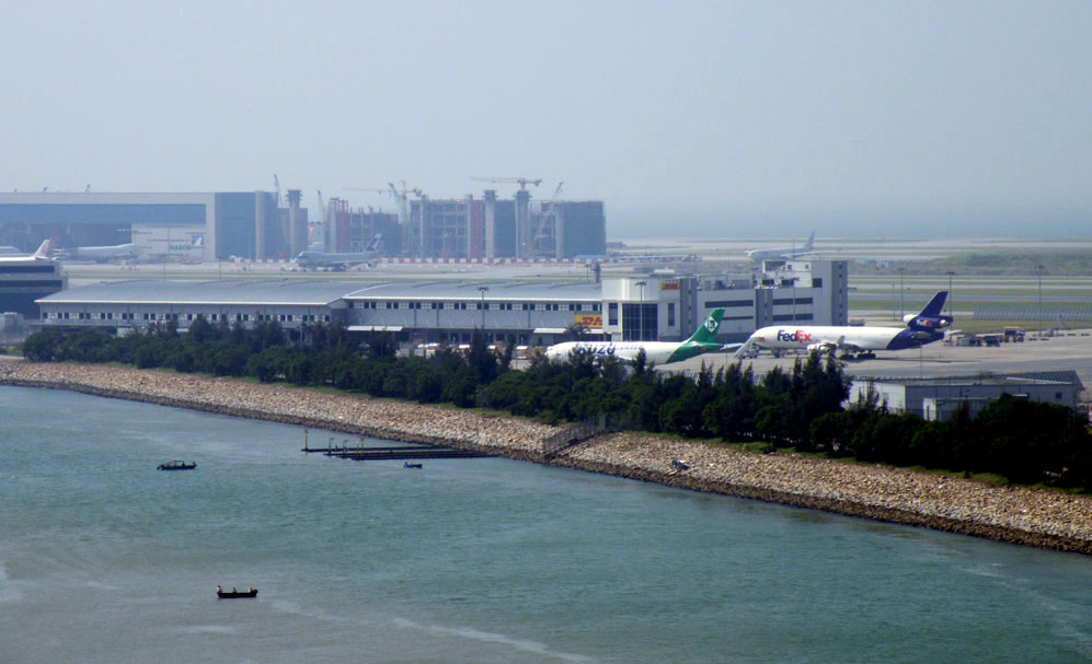 DHL Central Asia Hub